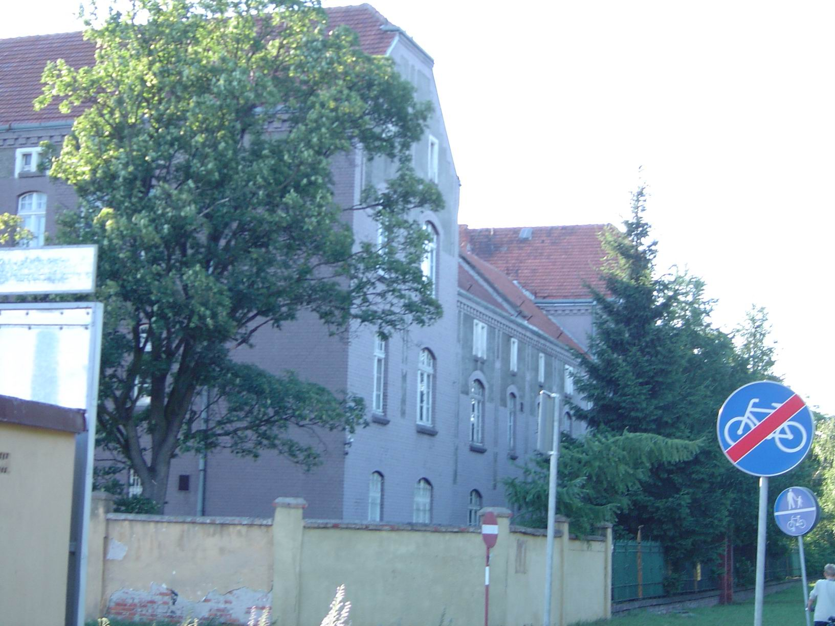 Koszary im. księcia Józefa Poniatowskiego w Grudziądzu